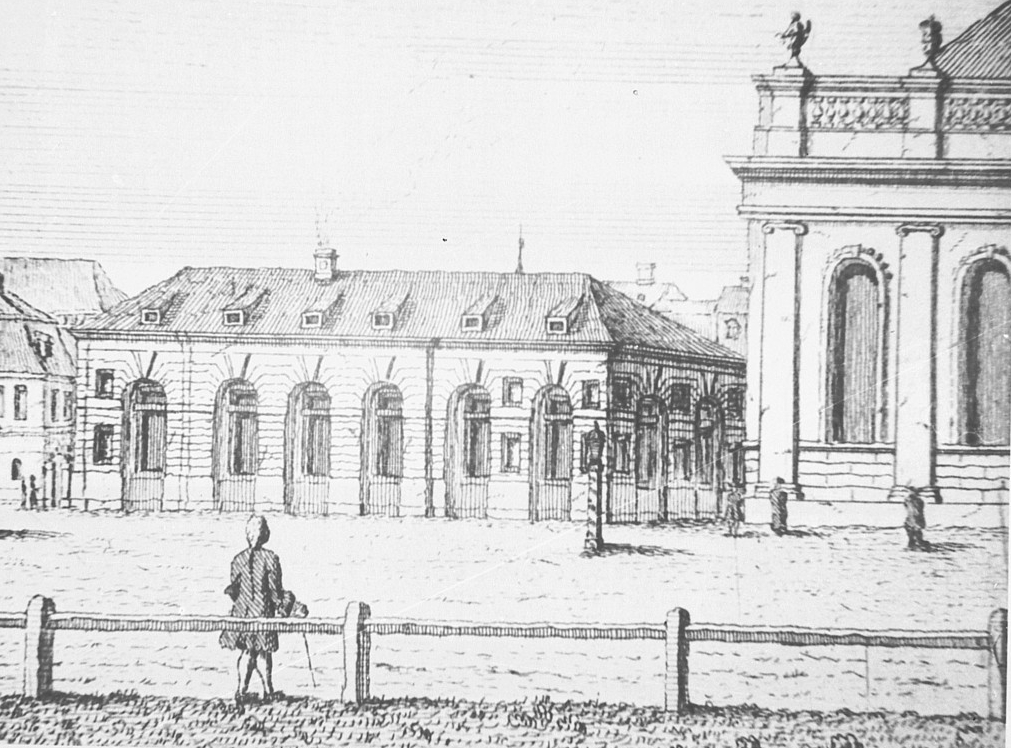 Königliches Waschhaus am Lustgarten in Berlin (neben dem Dom) 1770.